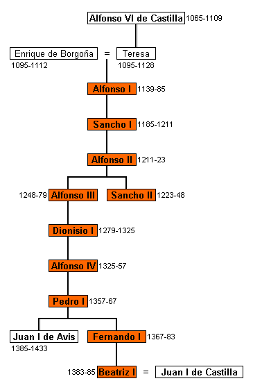 Árbol genealógico de los reyes de Portugal de la casa de Borgoña.